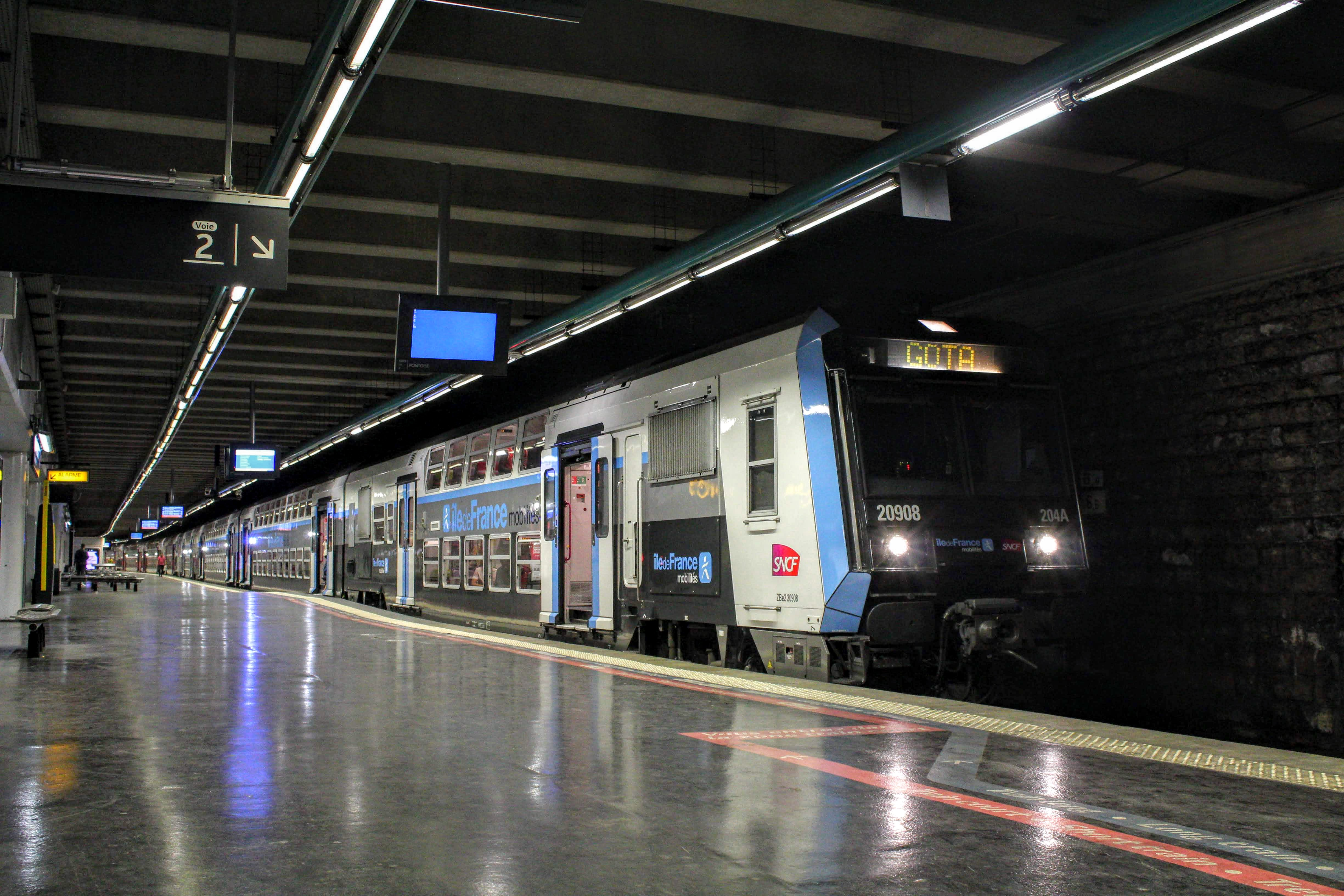 Gare de Neuilly-Porte Maillot (Transilien SNCF)